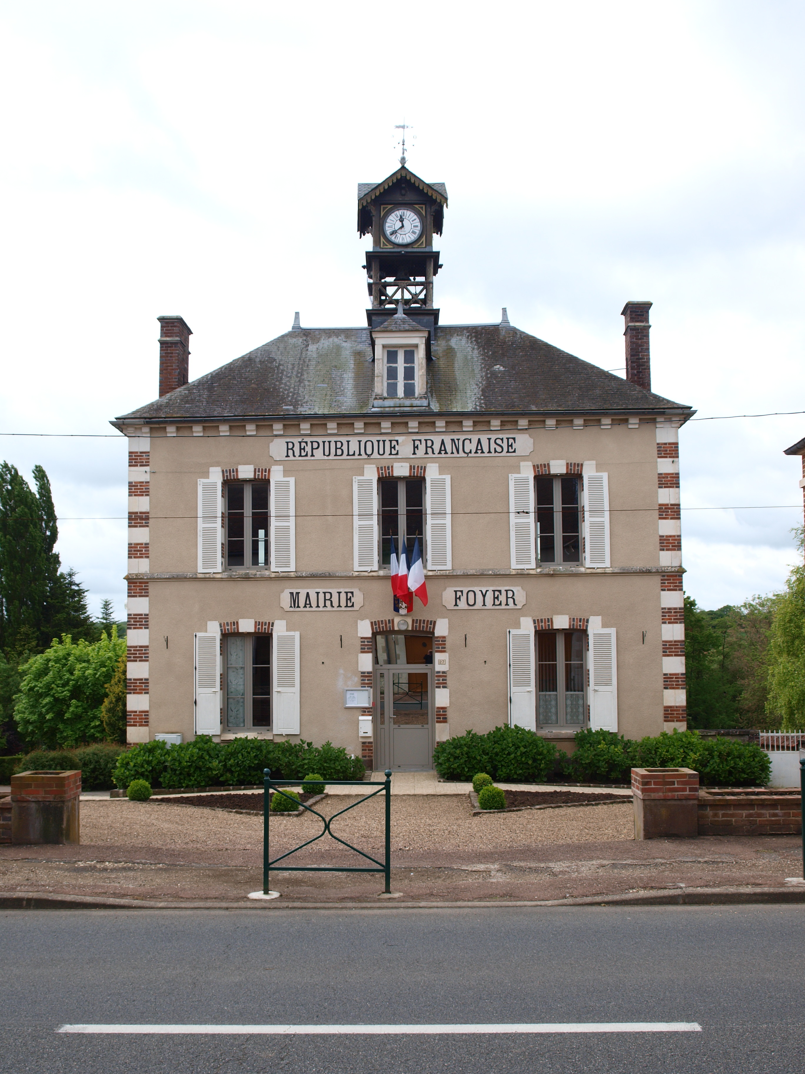 Lavau (Yonne)